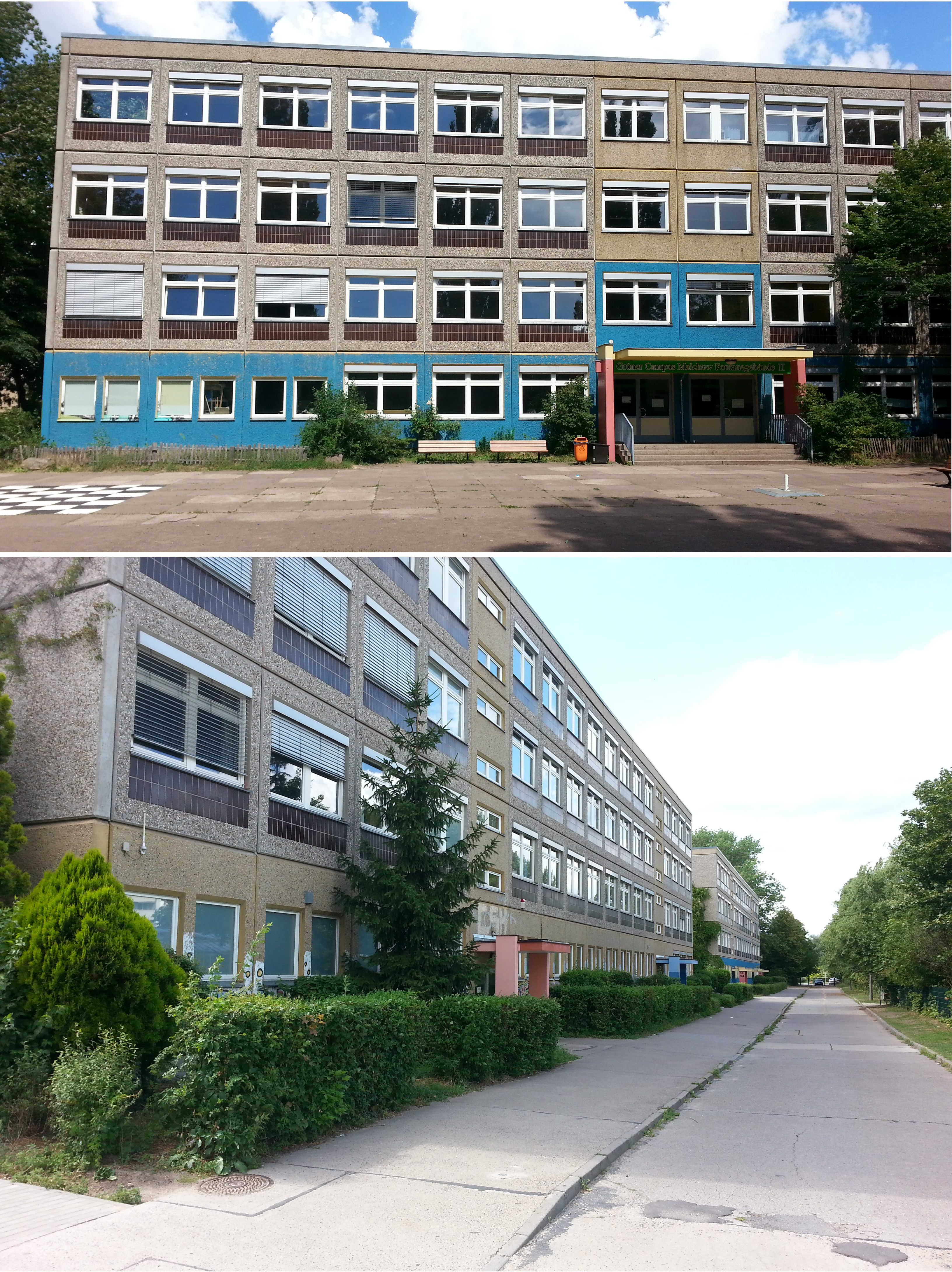 Grüner Campus Malchow Ansicht: Fontanegebäude II vom Schulhof und von der Doberaner Str.